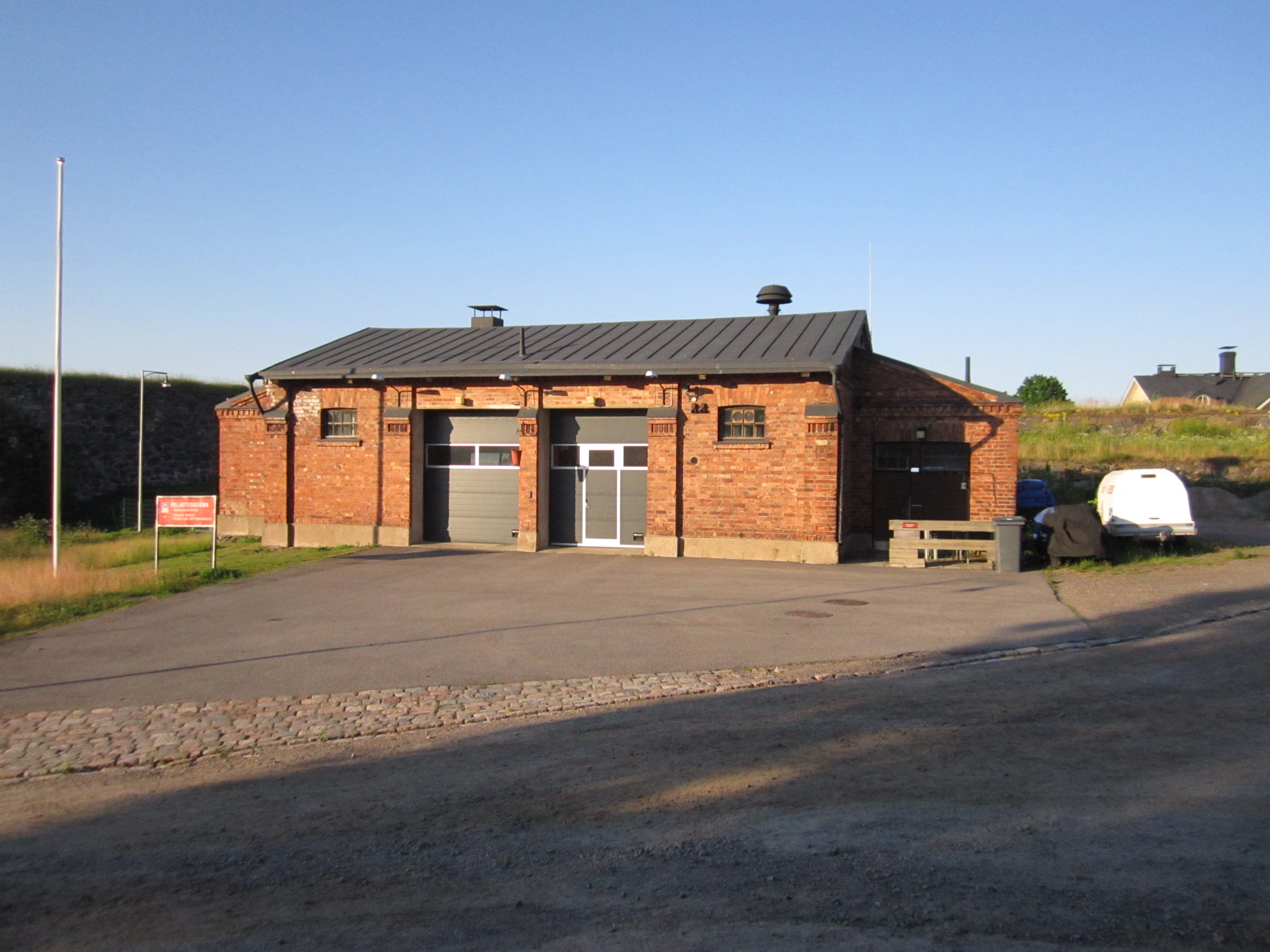 Suomenlinnan pelastusasema vuonna 2020.